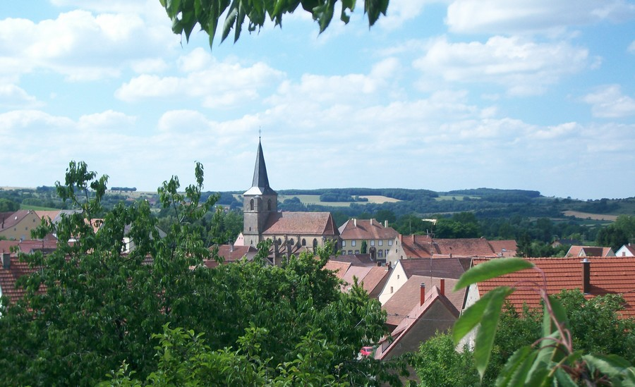 Vue sur l'église du XIVème et la mairie/école